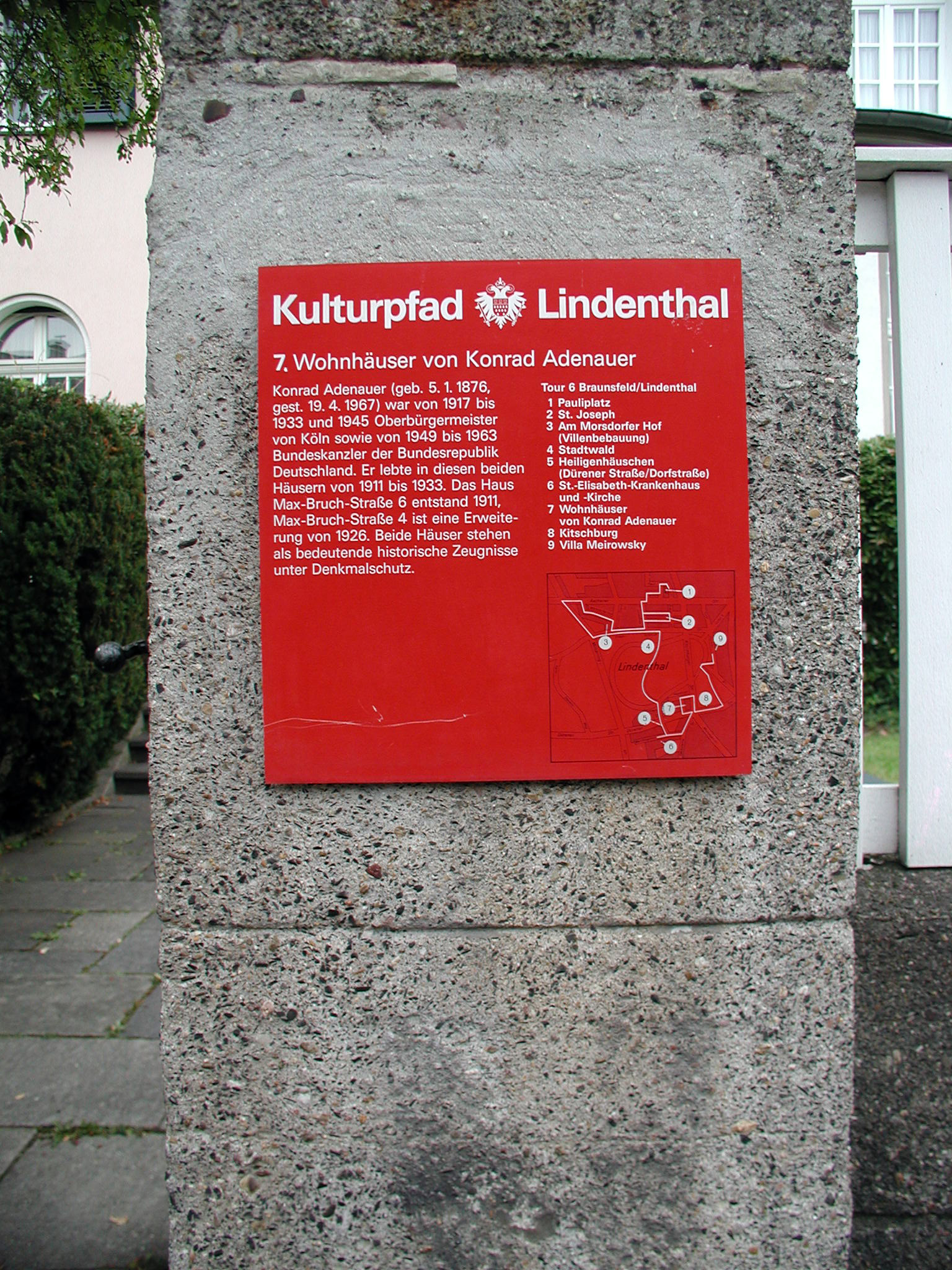 Köln Lindenthal